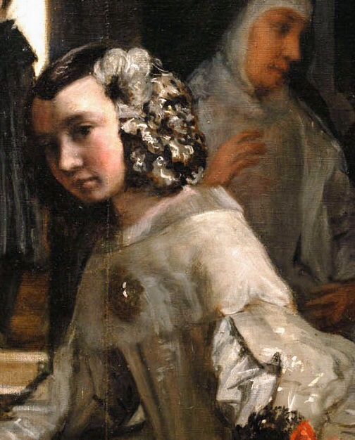 doña Isabel de Velasco and doña Marcela de Ulloa (r), detail of Las Meninas